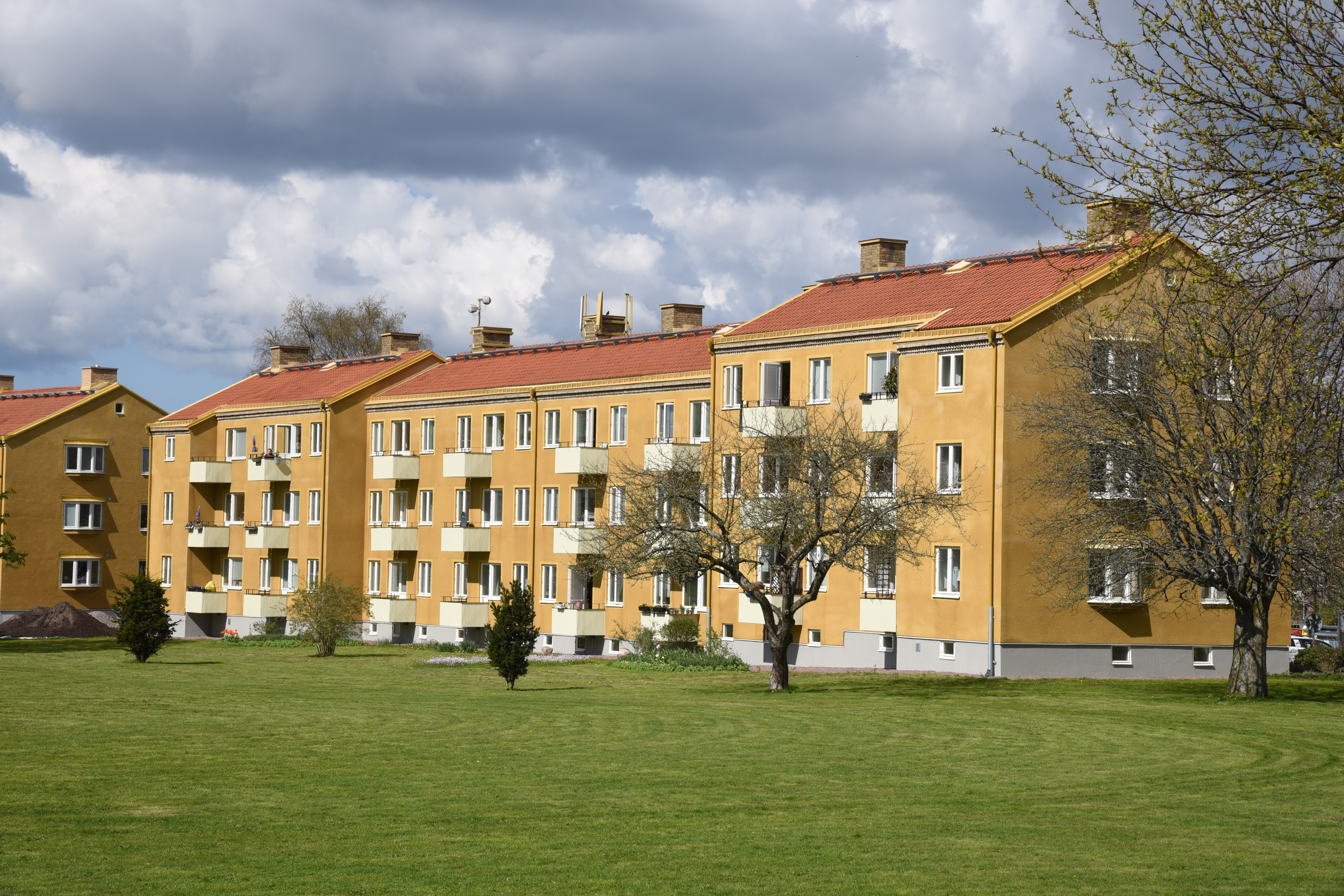 Bostadsområdet Västra Torpa uppfört 1946-1948 i stadsdelen Sävenäs i Göteborg. Arkitekt Nils Einar Eriksson och Erik Ragndal.